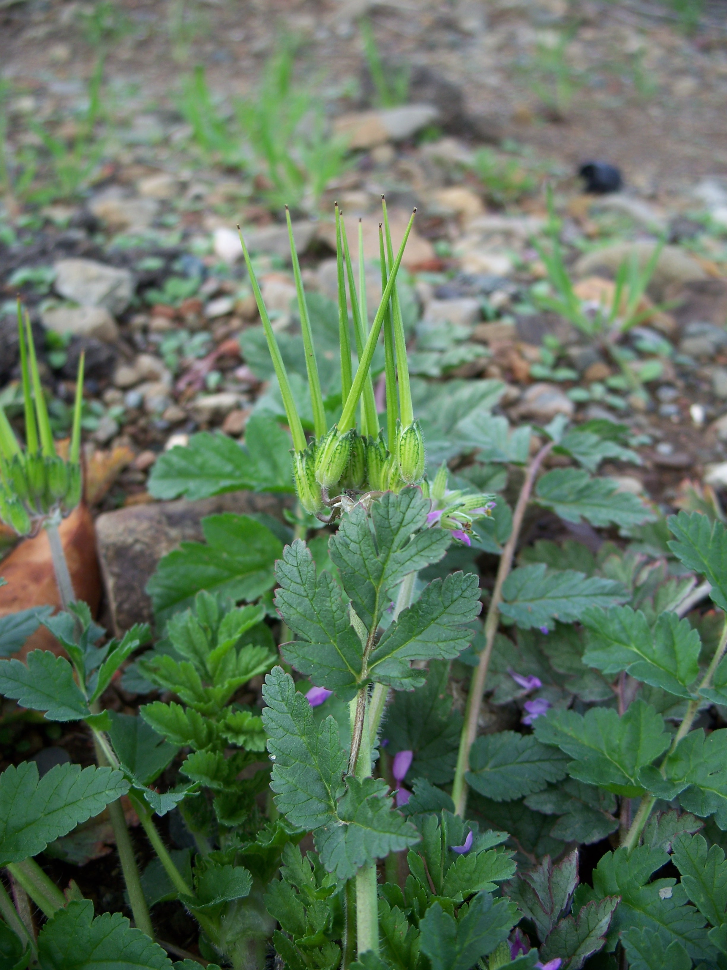 Erodium moschatum Made in San Jose, California. Identified by Franz Xaver.